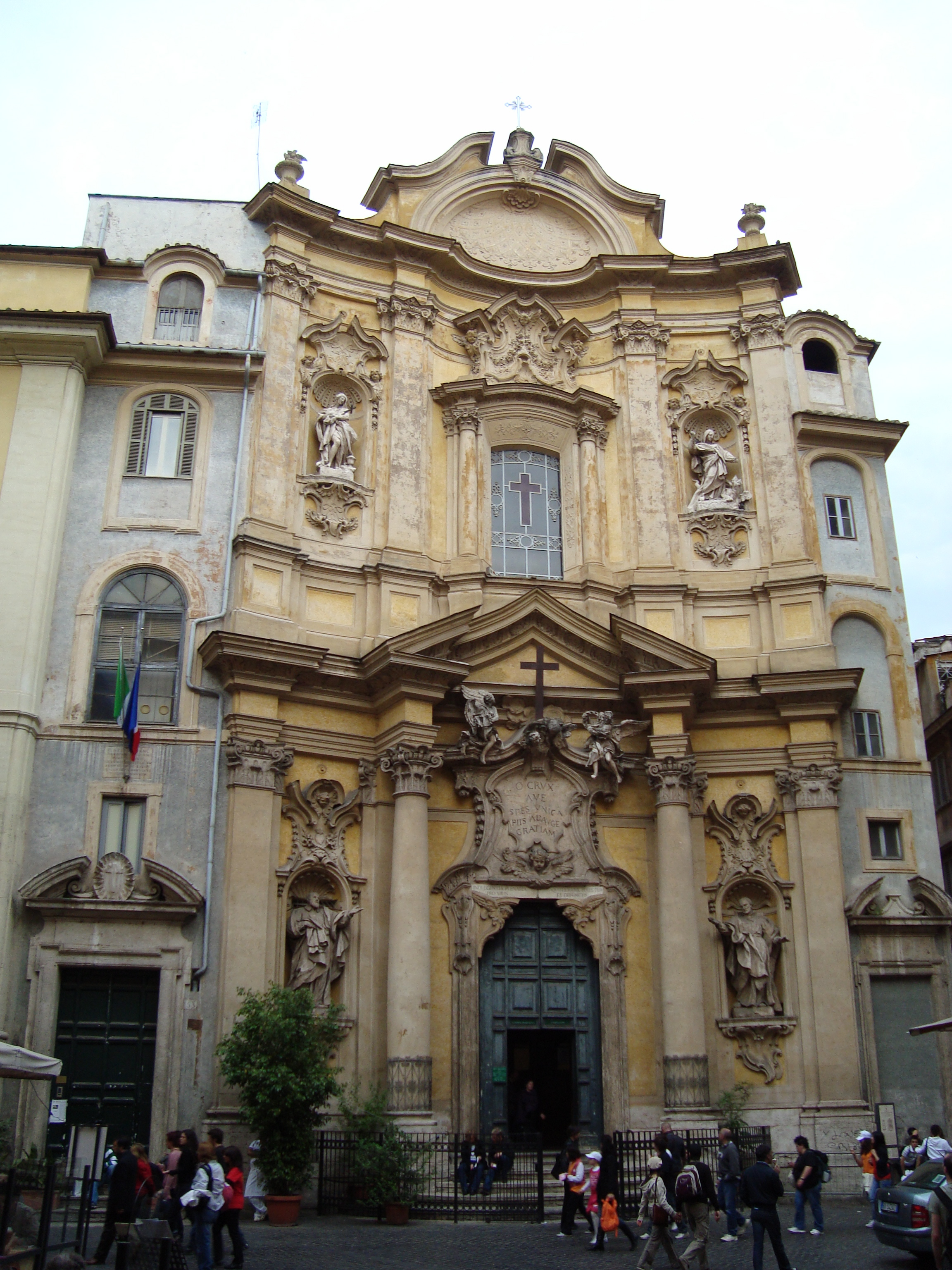 L'église Sainte-Marie-Madeleine à Piazza Maria Maddalena à Rome